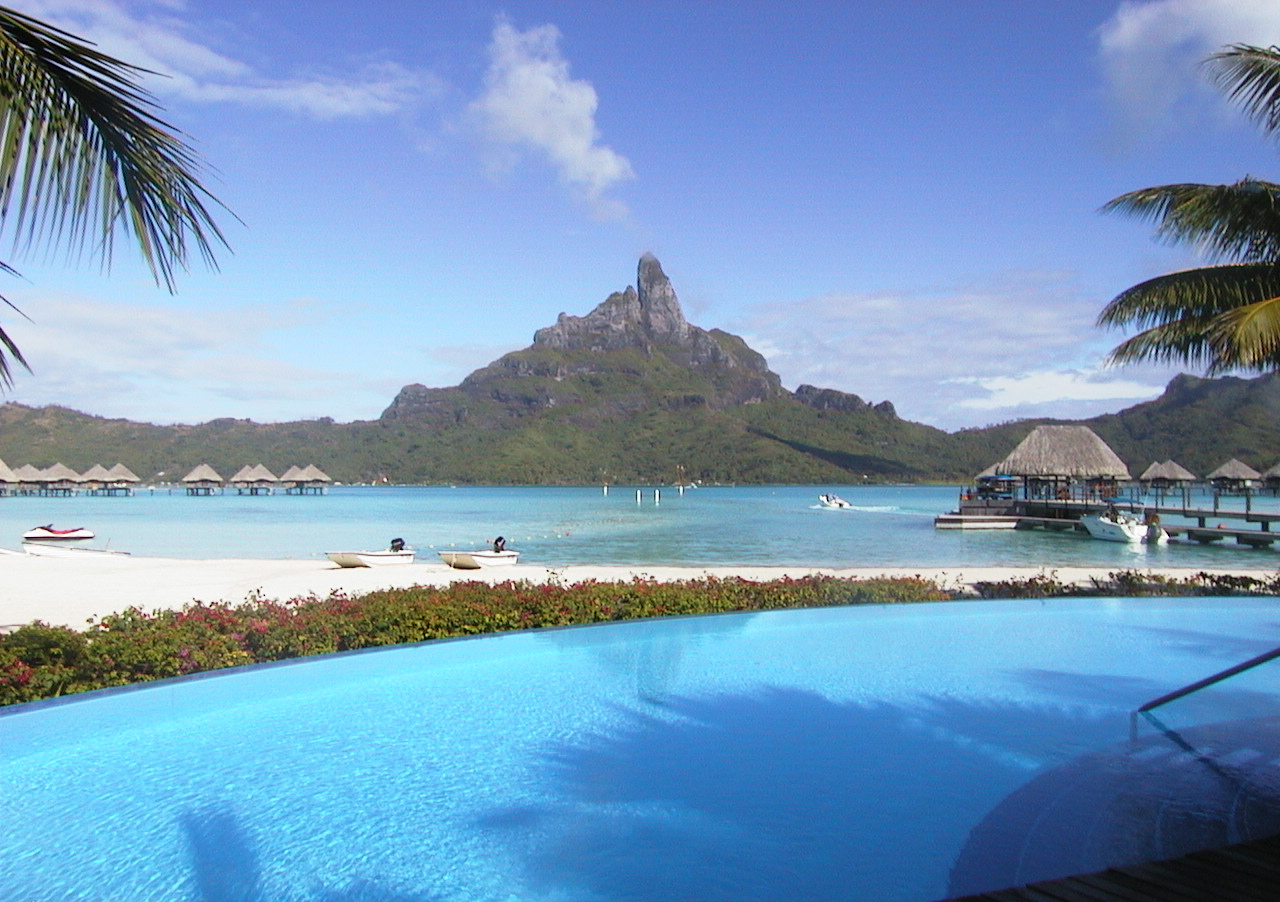 Bora Bora